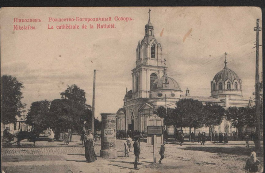 вулиця Лягіна до 1917 року